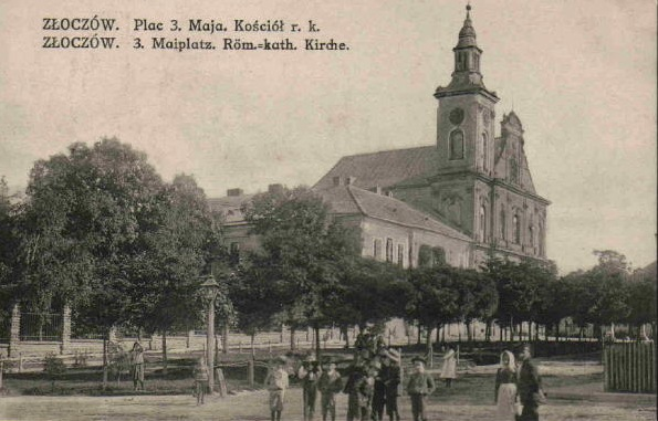 Plac 3 Maja w Złoczowie.